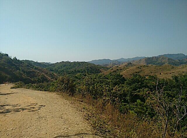 Via de acceso rural al Parque nacional Terepaima